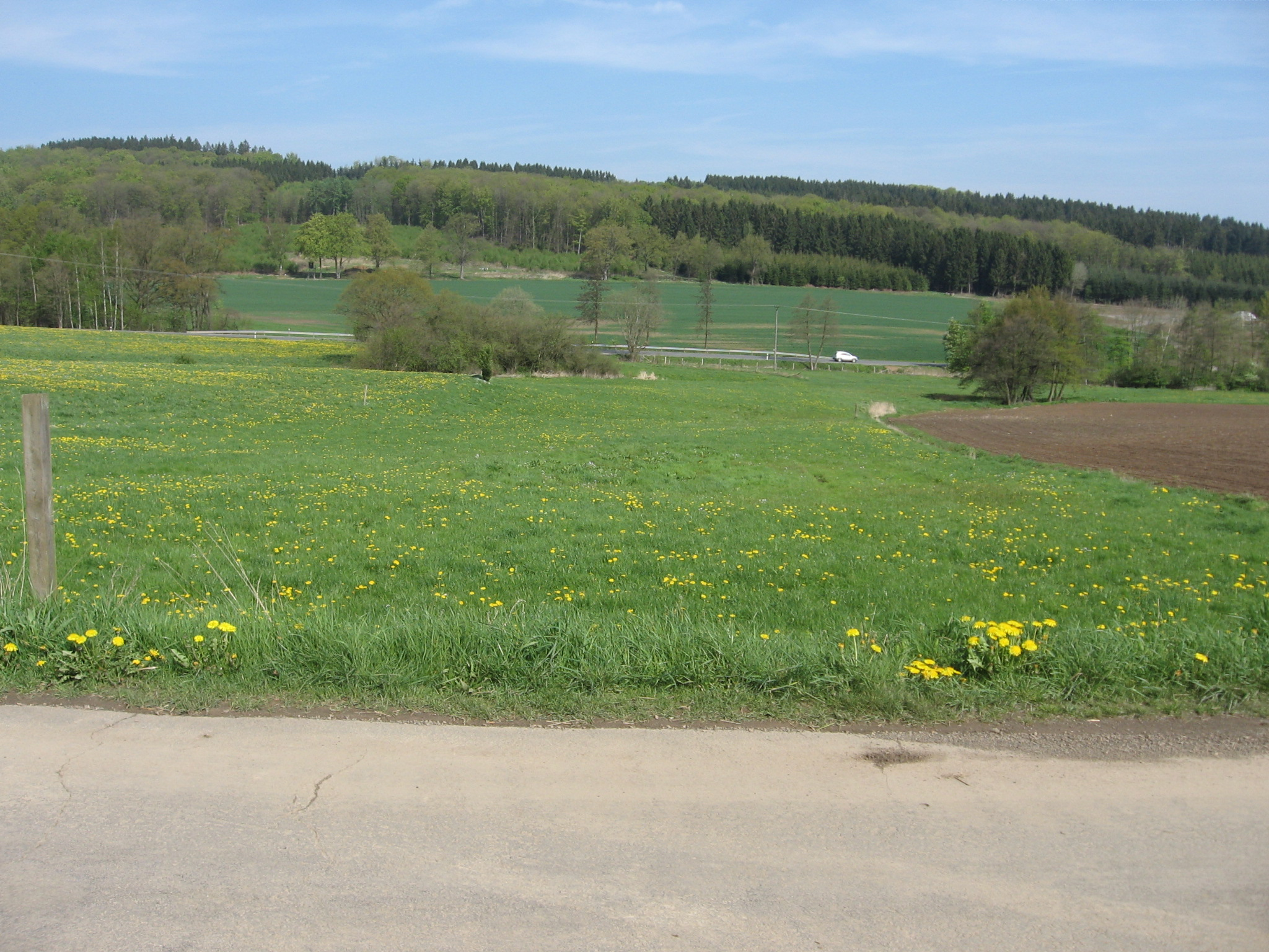 Naturschutzgebiet Nassweide südlich des großen Kamps von der Straße nach Seidfeld aus gesehen. NSG ist die Fläche zur Landstraße.